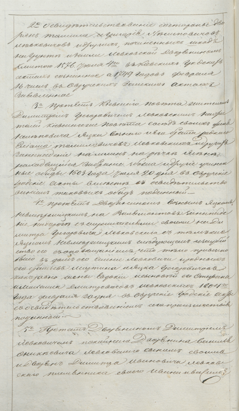 Возный Яцко Томилович Левковский, уп. 1603 год (ГАЖО: Родословная книга дворян Волынской губернии: под литерой "Л", Лист 173 об.; док. 3-е).